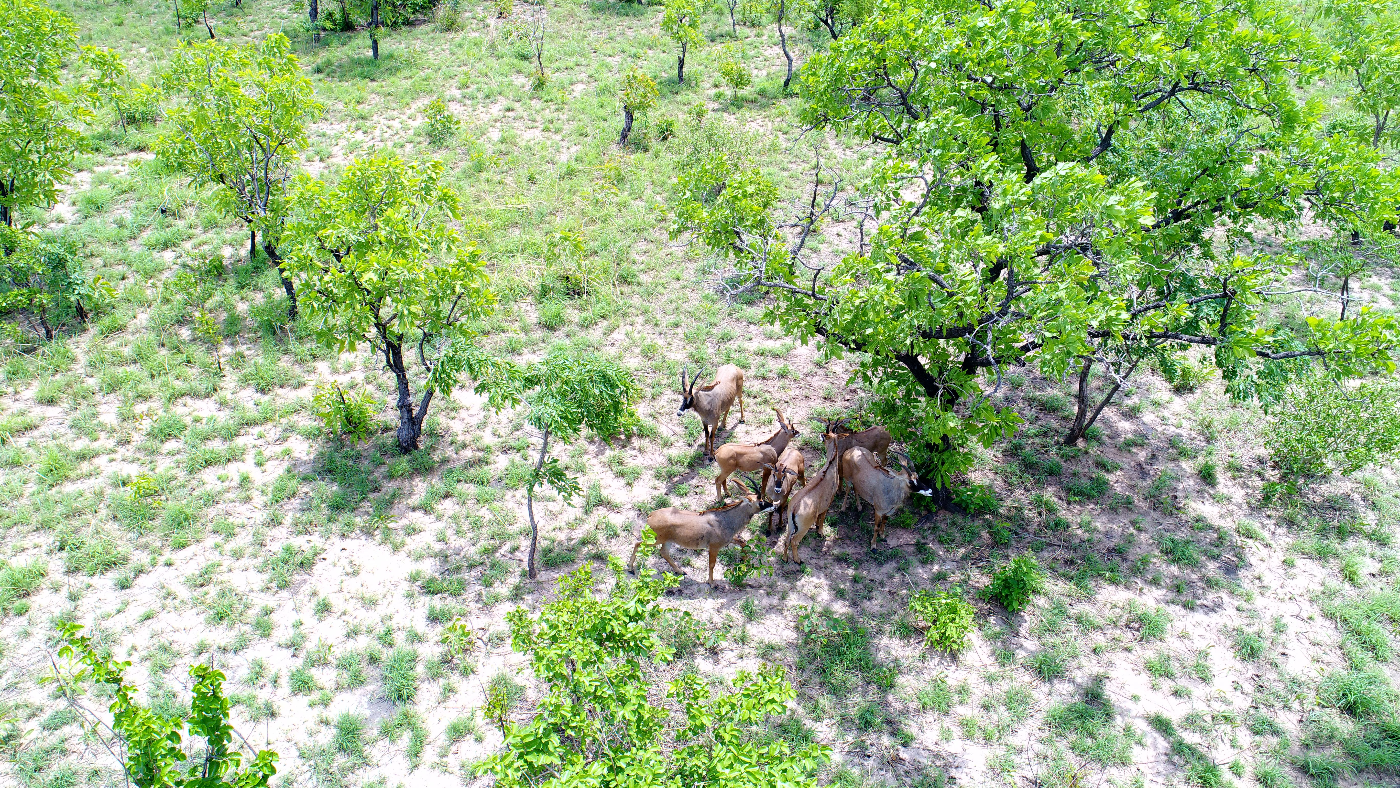 Troupeau Hippotragues (Hippotragus equinus) au repos.